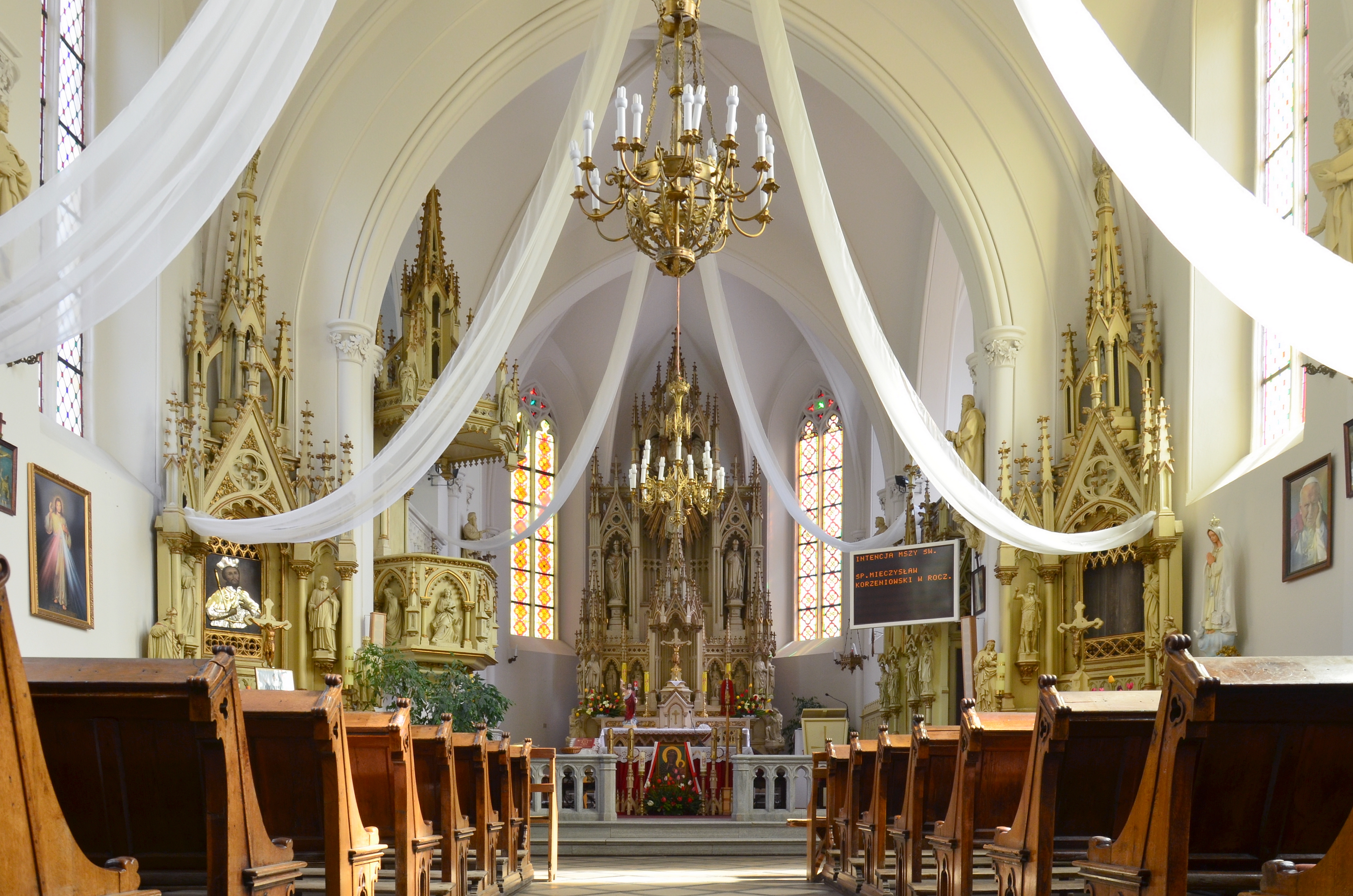 Jabłonowo-Zamek, kościół św. Wojciecha, 1860-1864